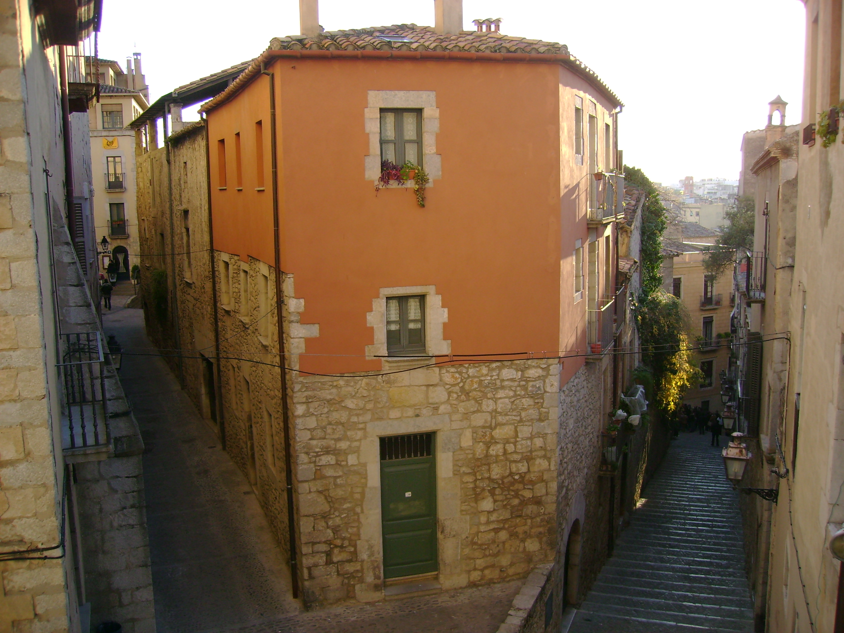 Calles en Gerona, España.